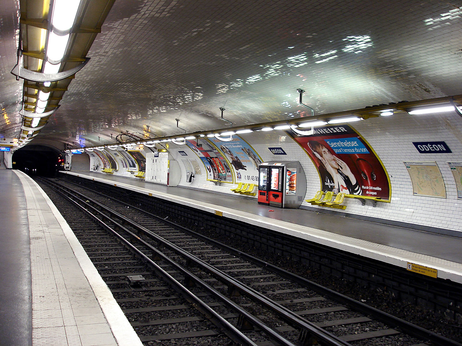 La station Odéon de la ligne 10 du métro de Paris, France